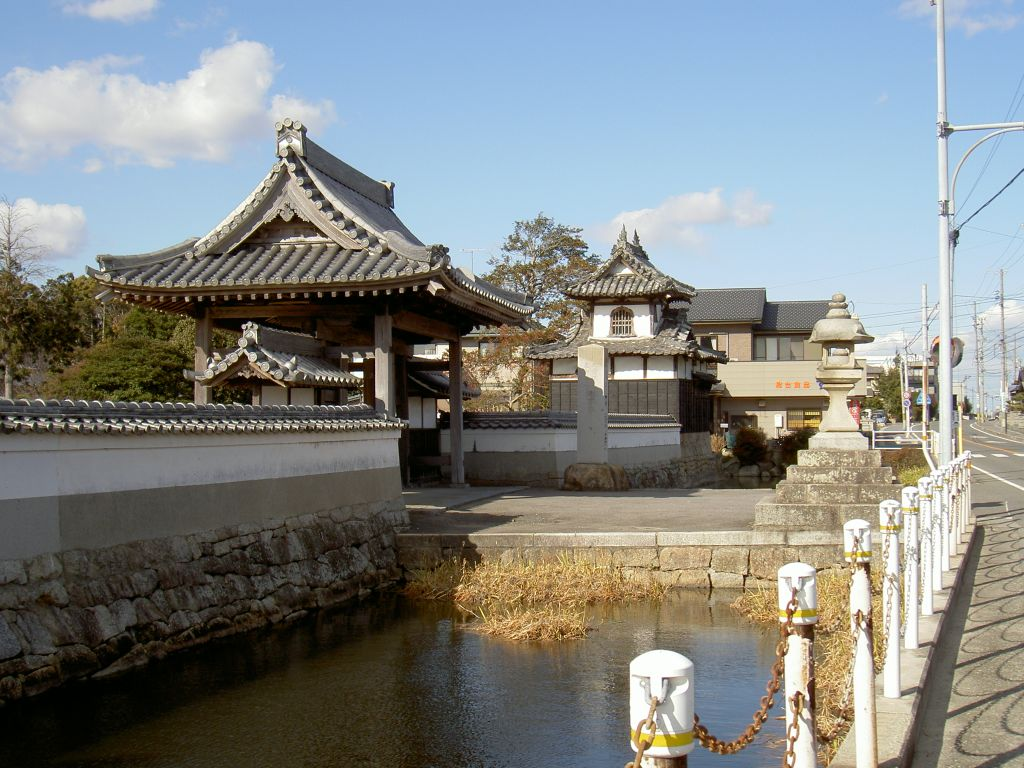 20060204におはぐろ蜻蛉が撮影。本證寺(安城市)の堀と鐘楼。城郭伽藍がよく保存されている寺として有名。 Honshōji, Anjō, Aichi, Japan